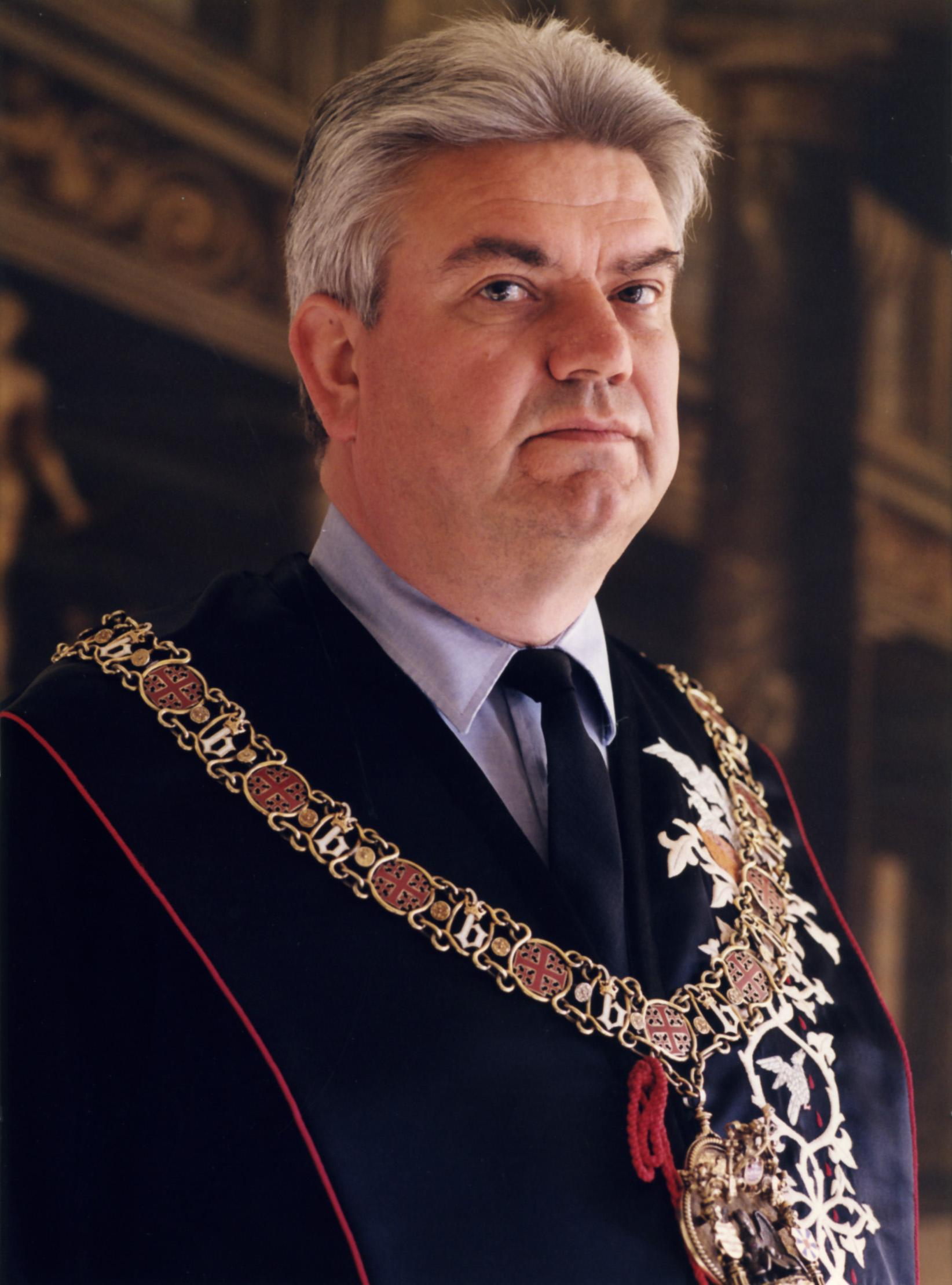 Pieter Huys (Menen, 29 juni 1947 - Brugge, 8 juli 2009) was advocaat, uitgever en publicist in Brugge. -- Portretfoto van Meester Pieter Huys, omgord met de halsketting van proost van de Edele Confrérie van het Heilig Bloed in Brugge